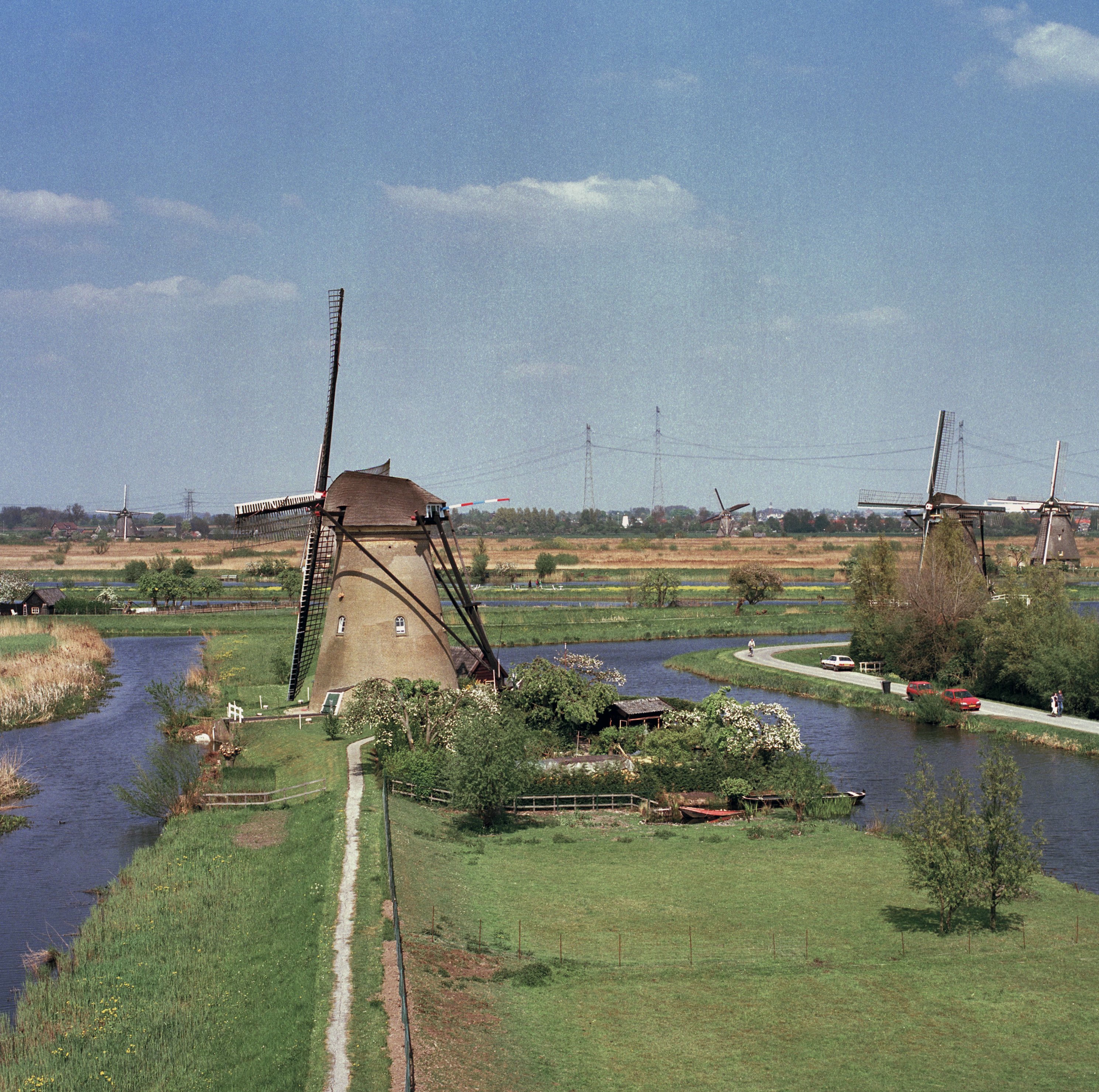 Nederwaard Molen No. 6: Overzicht met molen No. 6 van de Nederwaard op de voorgrond, gezien vanuit de kap van molen No.7 van de Nederwaard (opmerking: Gefotografeerd voor plaatsing op de Werelderfgoedlijst)